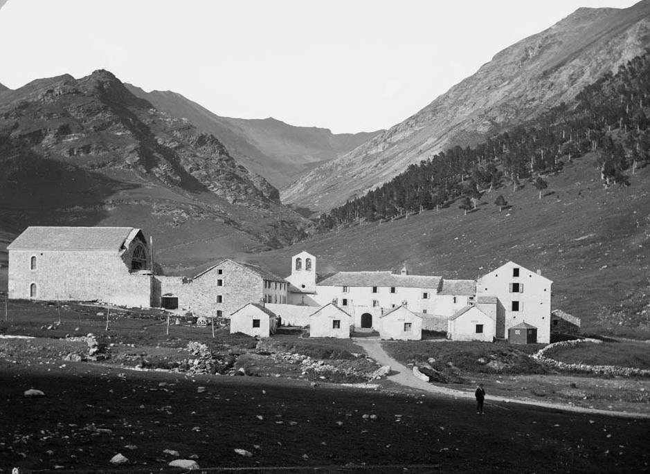 Imatge